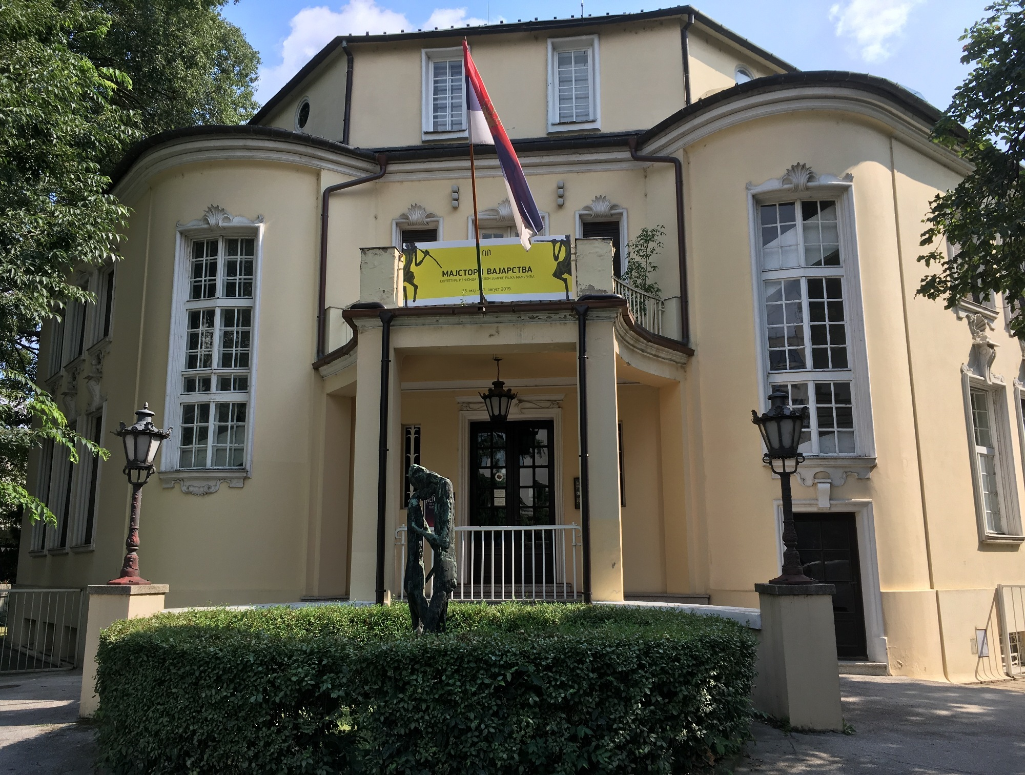 Zgrada - Poklon-zbirka Rajka Mamuzića